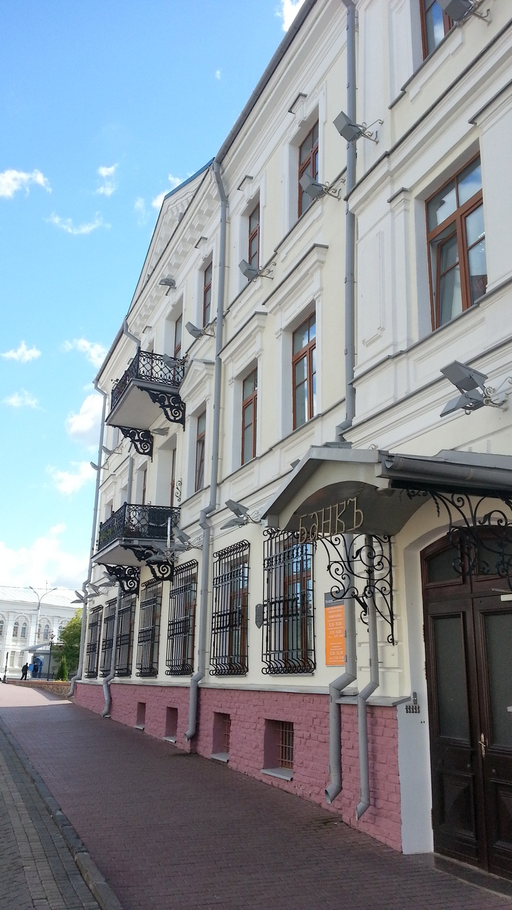 Беларуская (тарашкевіца): Будынак былога Маскоўскага міжнароднага банка. г. Віцебск This is a photo of Belarusian heritage monument. Reference number: 213Г000088 ( WLM)